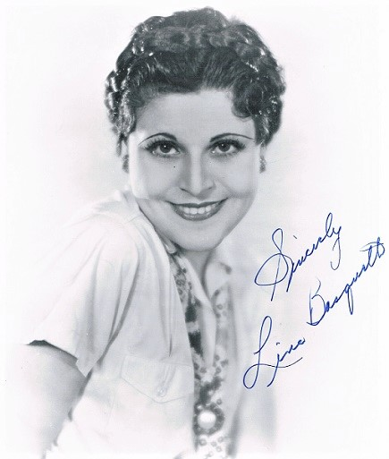 Lina Basquette